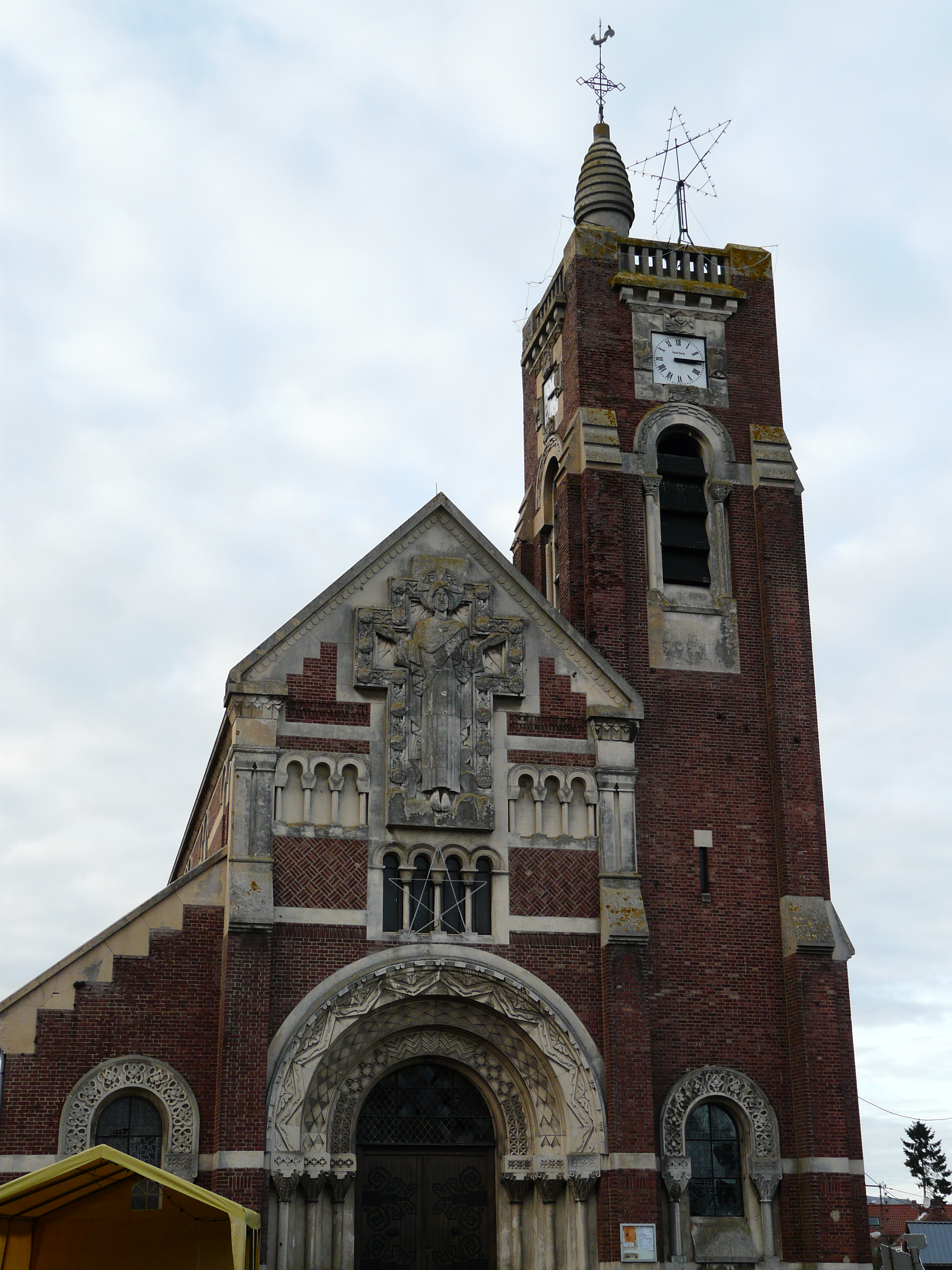 L'église Saint-Martin d'Abancourt (Nord) construite après la Première Guerre mondiale par Pierre Leprince-Ringuet